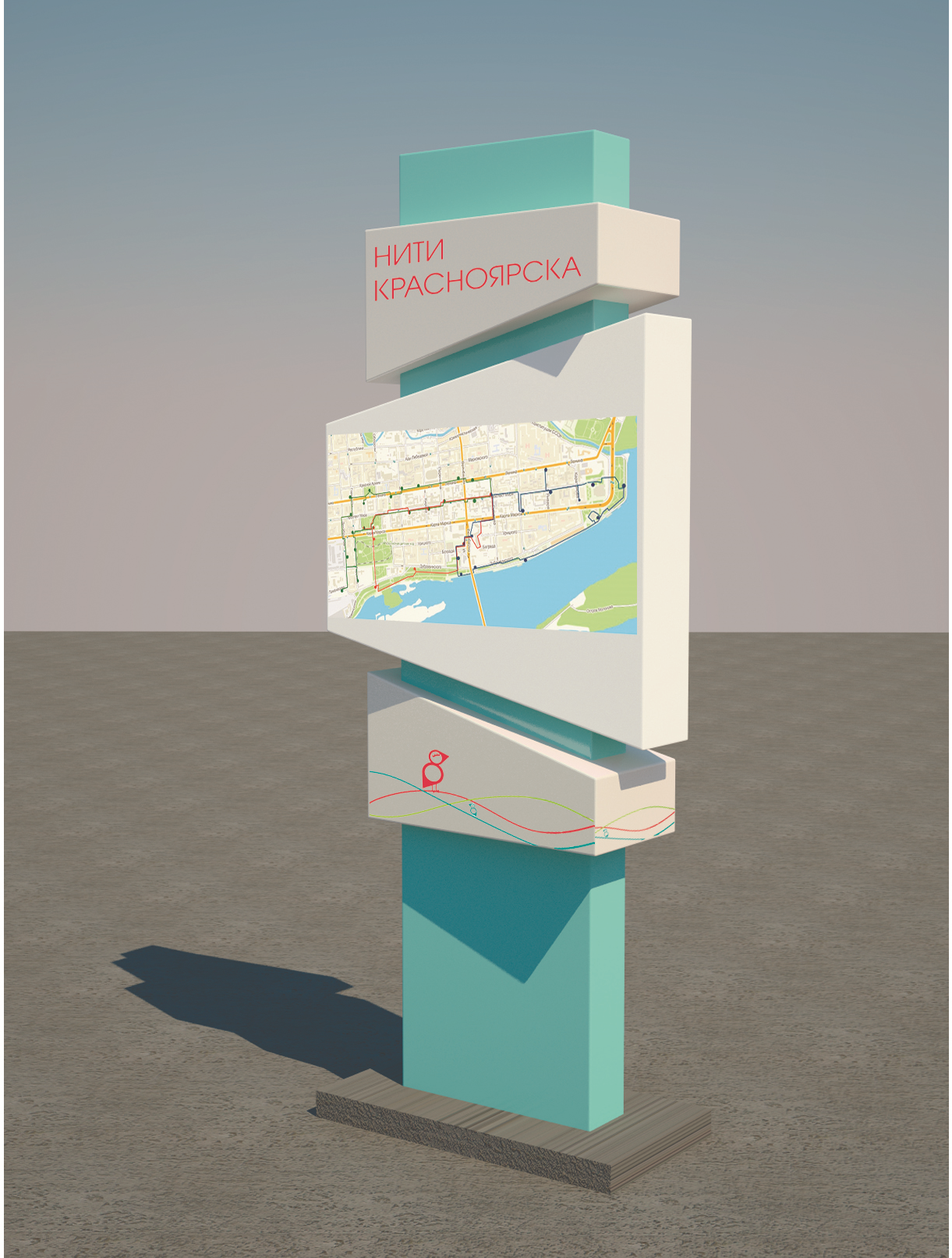 Проект информационной стойки "Нити Красноярска", выполненный студентом института архитектуры и дизайна Сибирского Федерального университета.